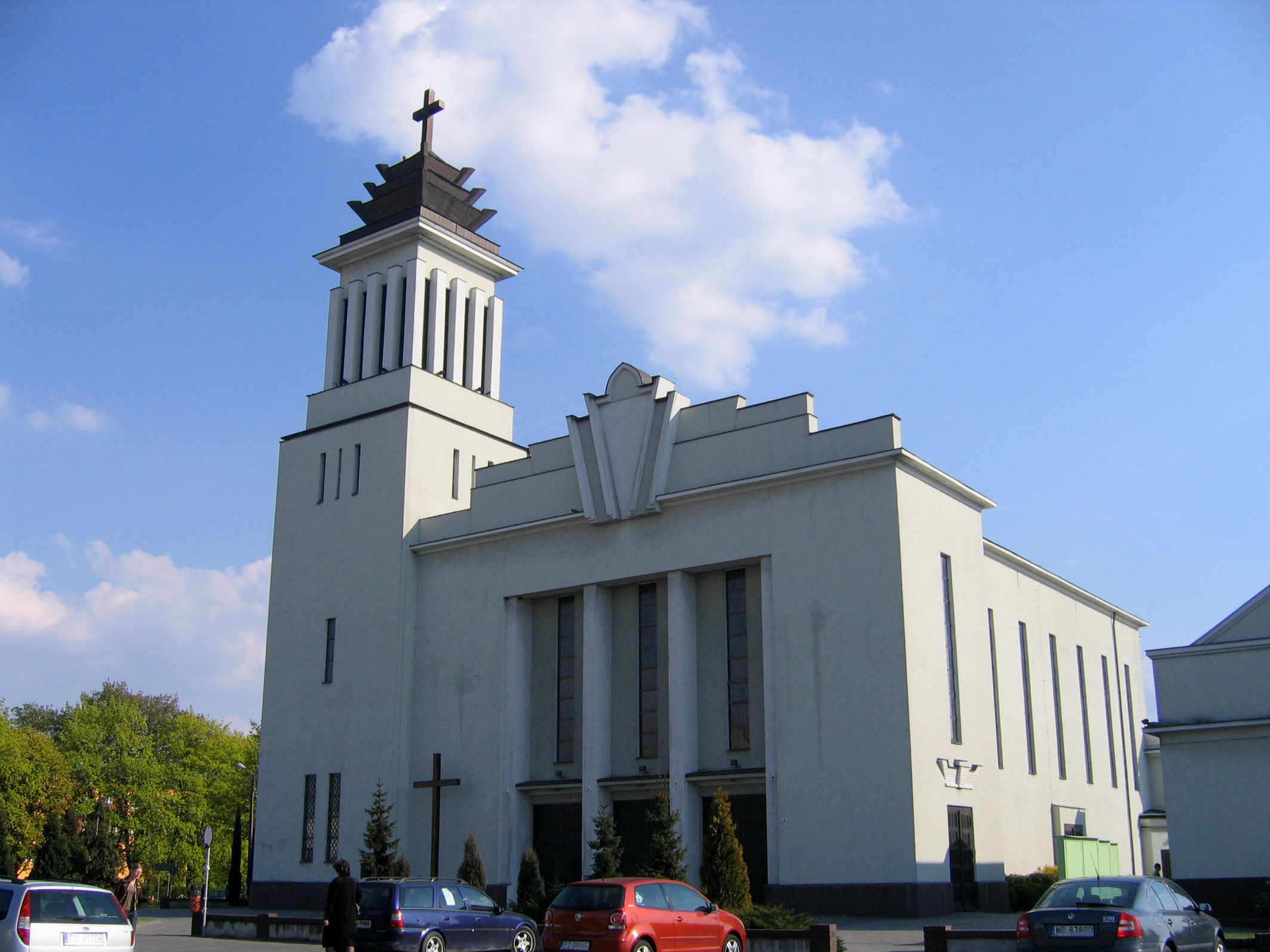 kościół św. Trójcy na Dębcu, Poznań